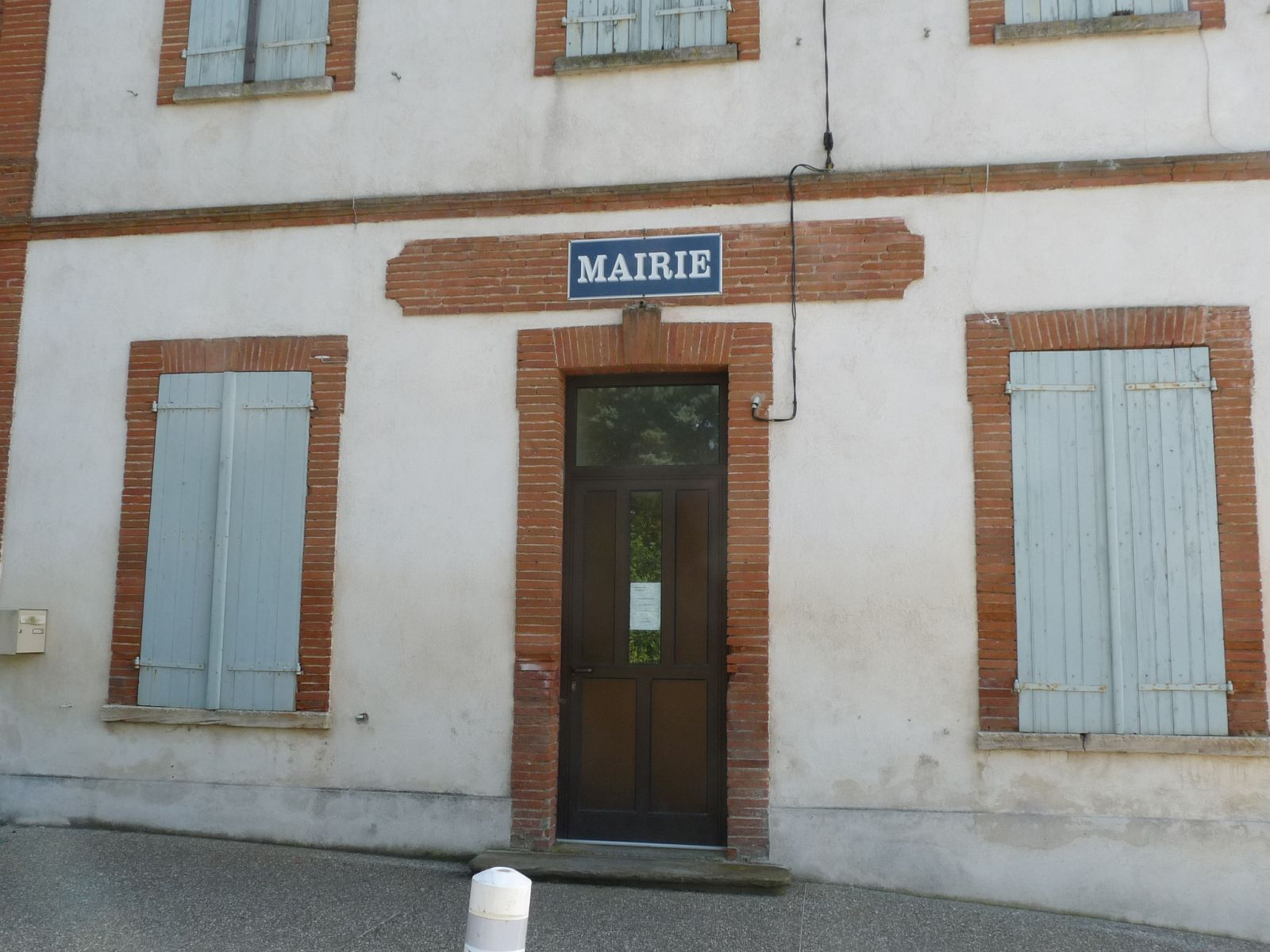 Mairie de Monestrol, Haute-Garonne, France